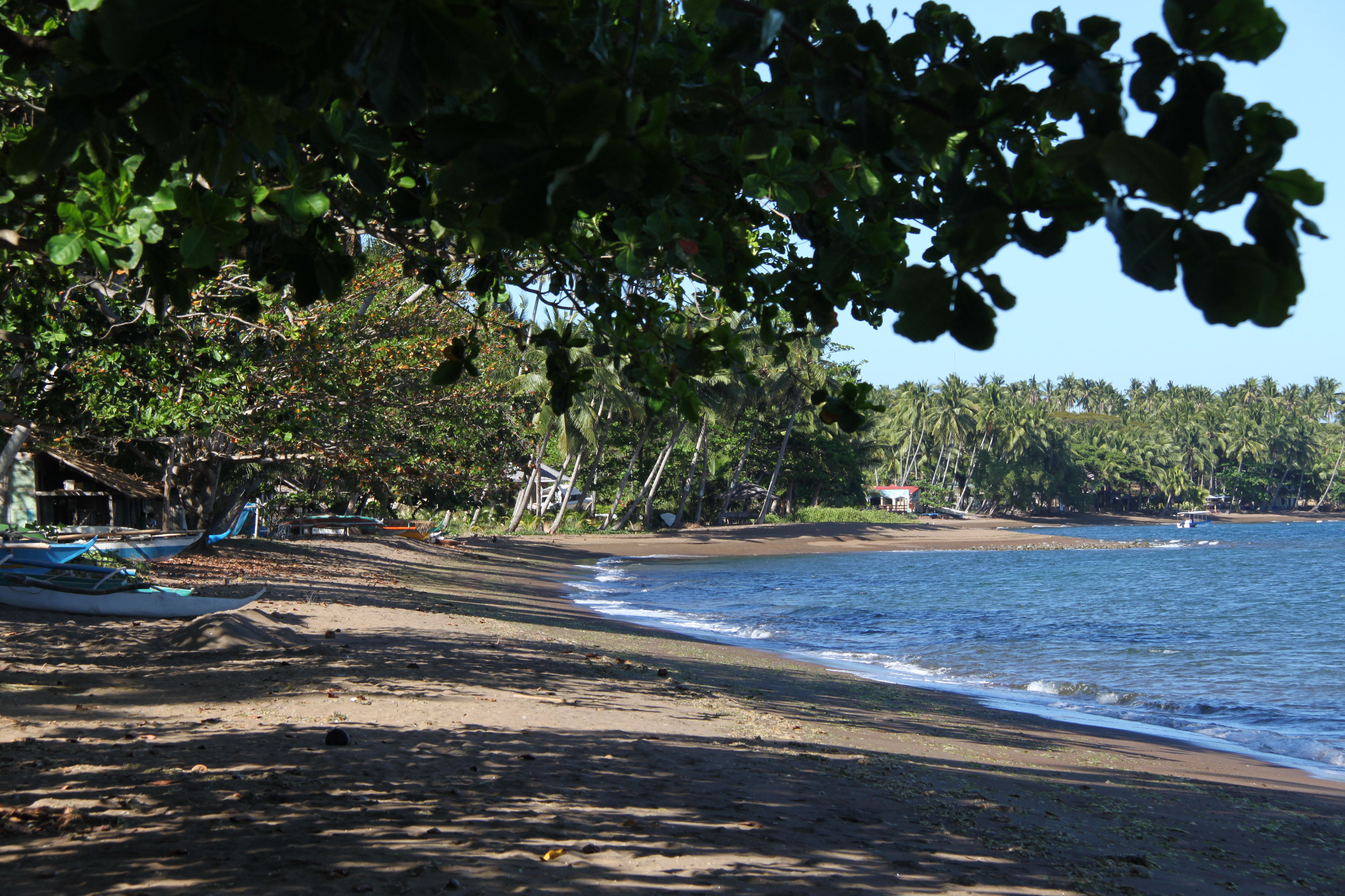 Dauin, Negros Oriental, Philippines